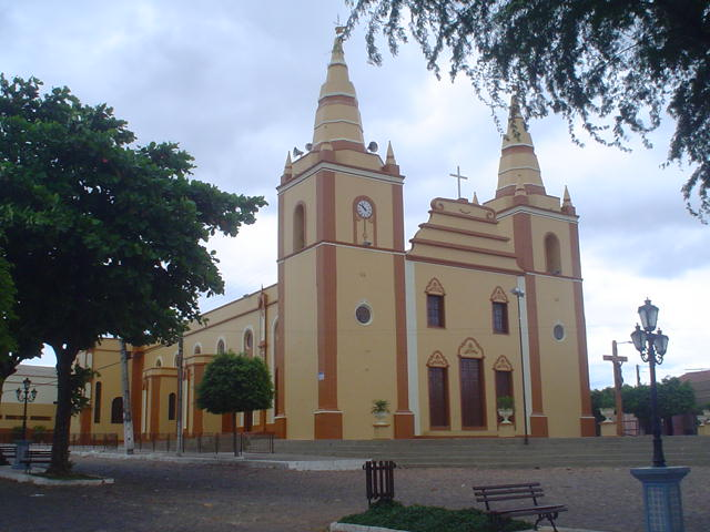 Foto produzida pelo cooperador na cidade de Barbalha, Ceará. É a igreja da Matriz, chamada de igreja de Santo Antonio.